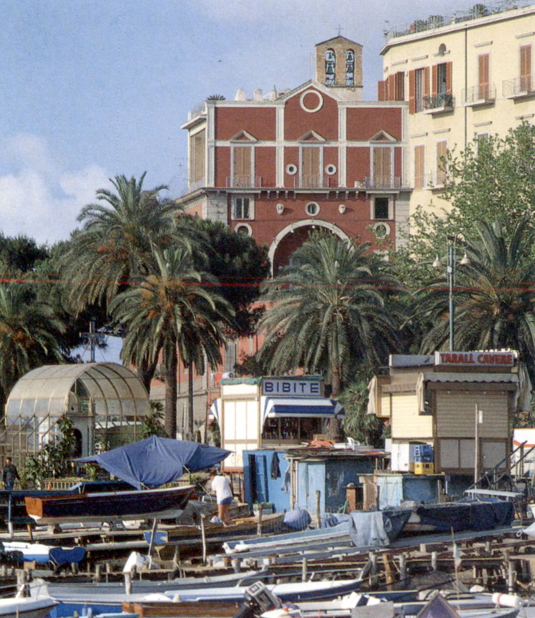 Santa Maria del Parto (Napoli)